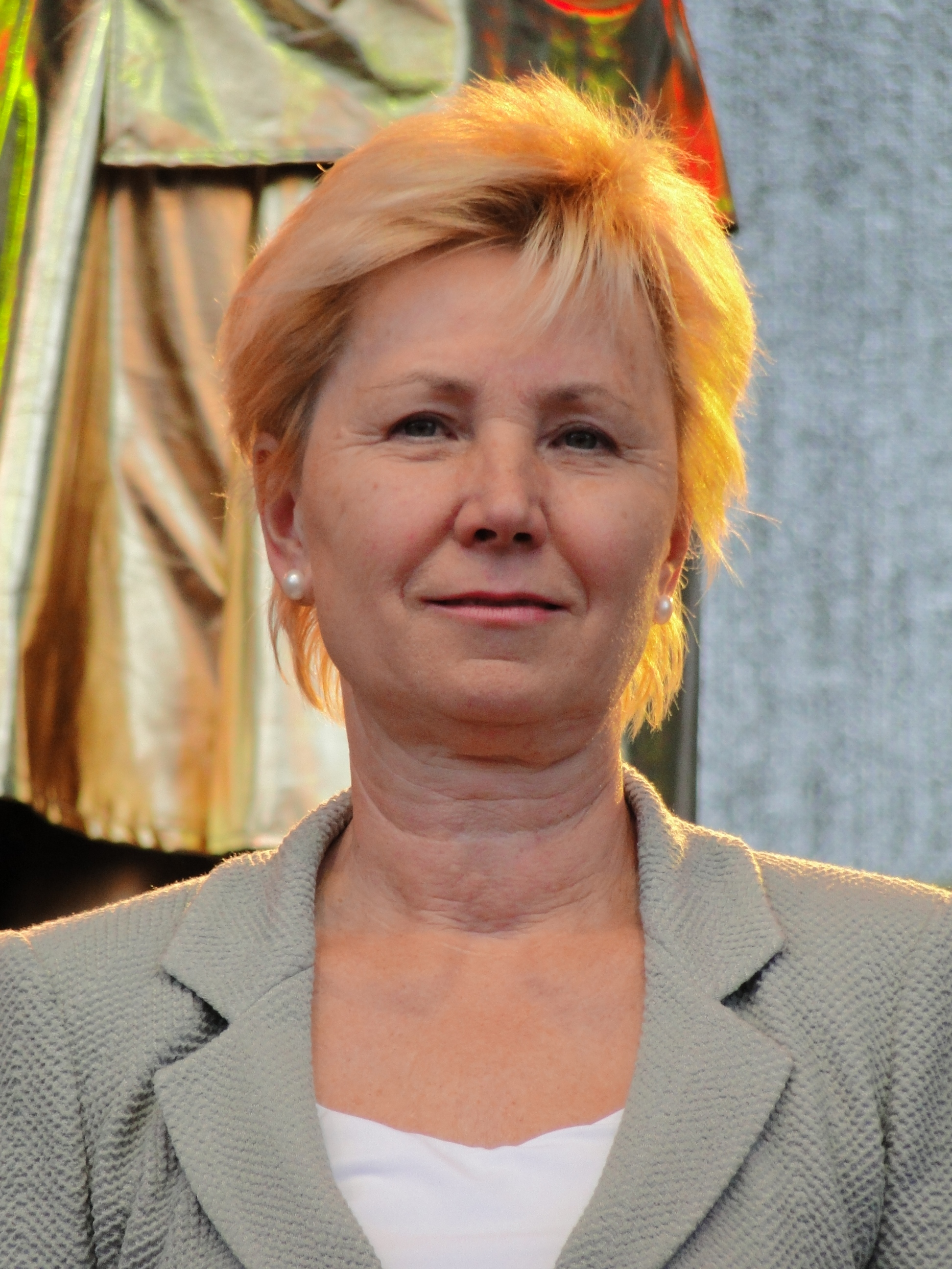 Helma Orosz, Oberbügermeisterin von Dresden, 2010